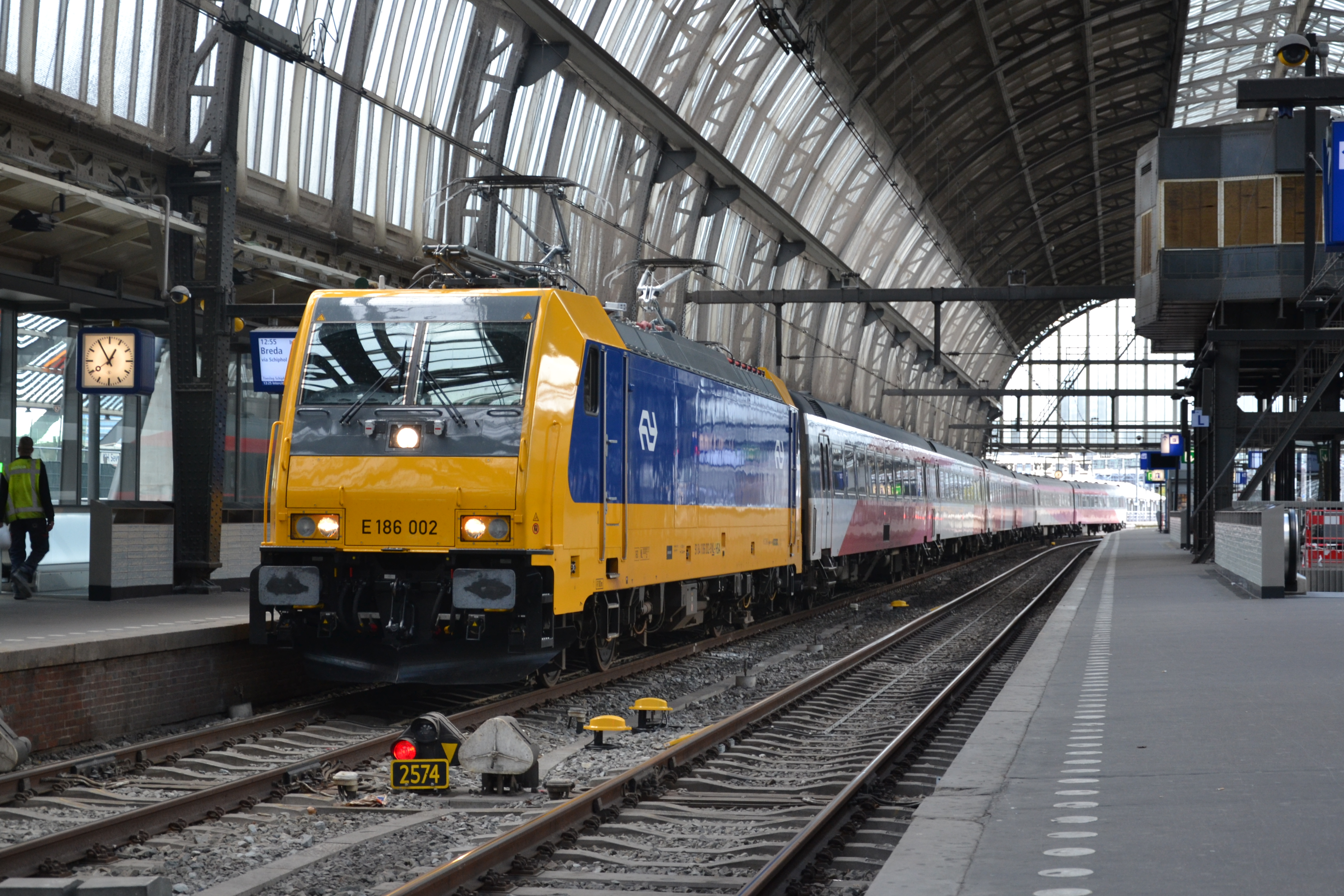 De nieuwe TRAXX-locomotief voor de Intercity direct in Amsterdam.